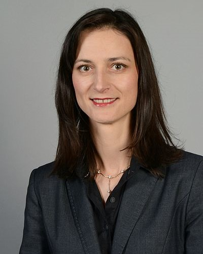 Mariya Gabriel, Bulgarien, 2014 Mitglied des Europäischen Parlaments (MEP)